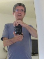 Foto de l'autor, ERamon Dachs, davant mirall